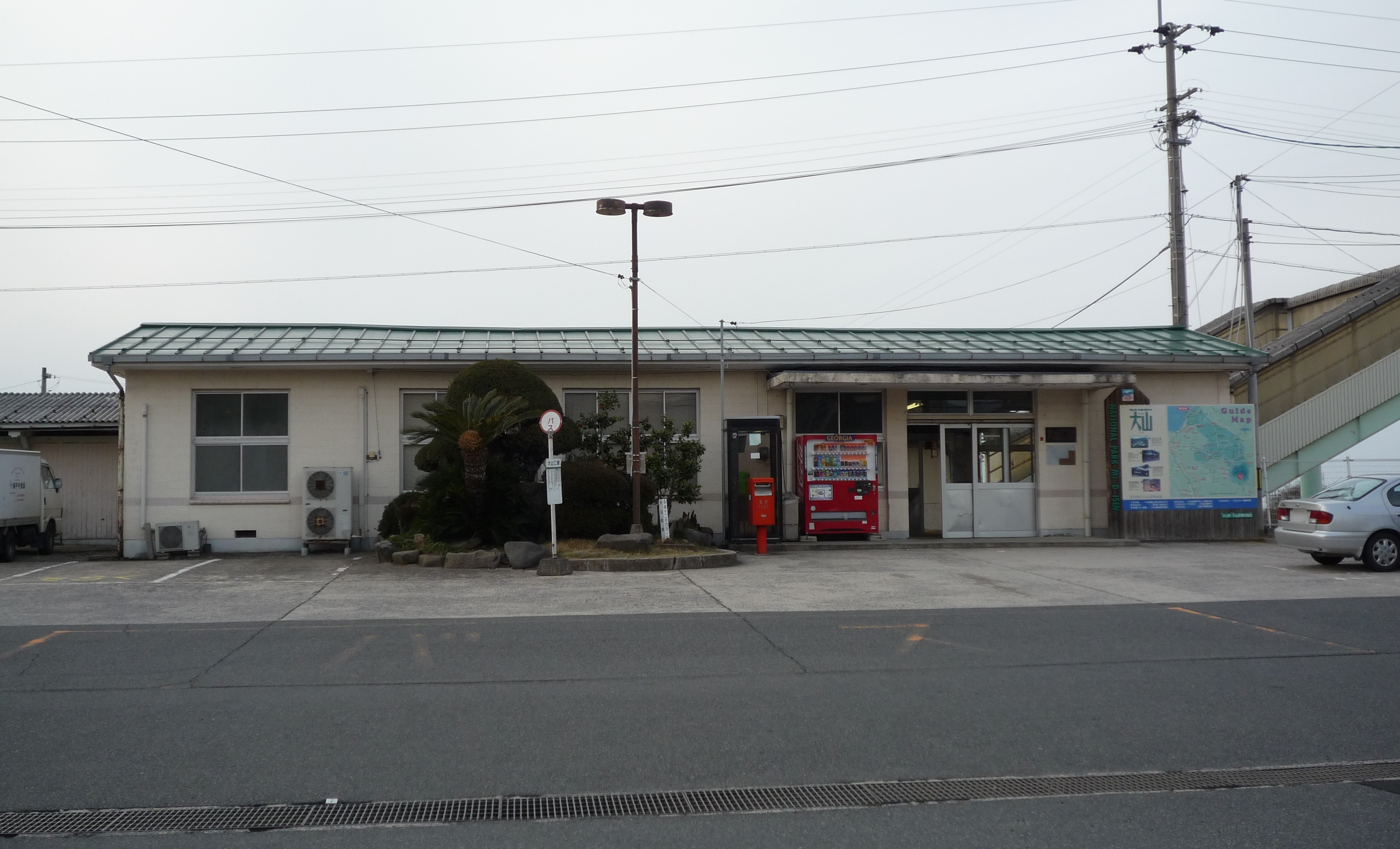 山陰本線大山口駅